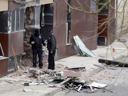 Bomb blast in Lazkao, Gipuzkoa, Spain.